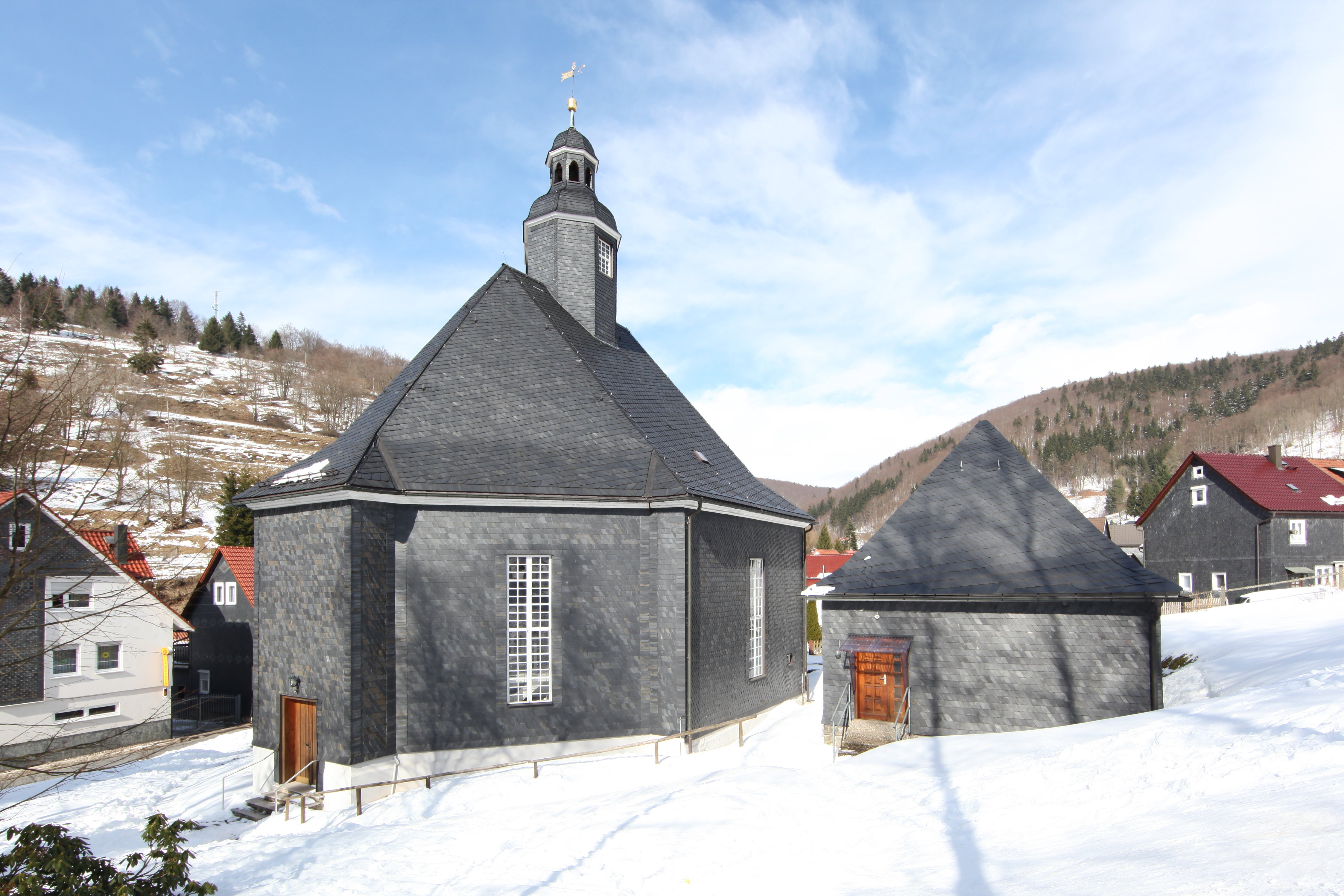 Evangelisch-Lutherische Kirche Zur heiligen Dreifaltigkeit in Gießübel, OT von Schhleusegrund, Landkreis Hildburghausen